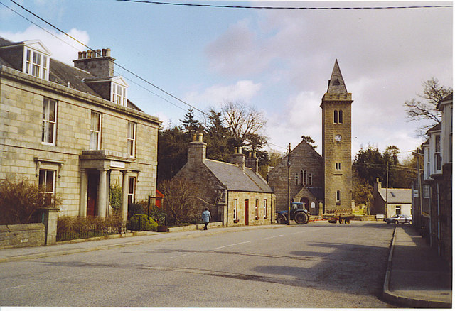 Old Deer, Aberdeenshire